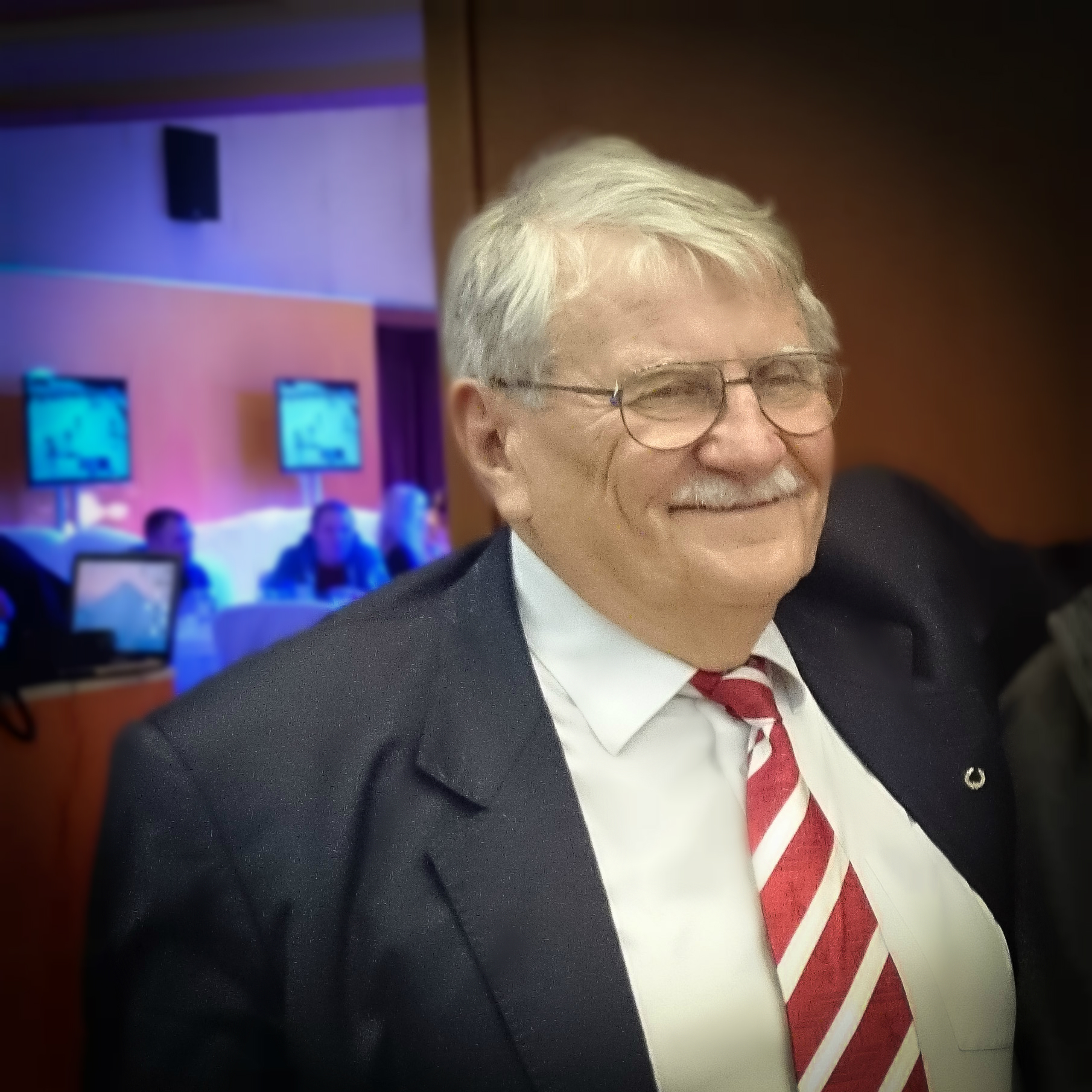 Bijušais Latvijas Olimpiskās komitejas ilggadējs vadītājs, komitejas Goda prezidents Vilnis Baltiņš